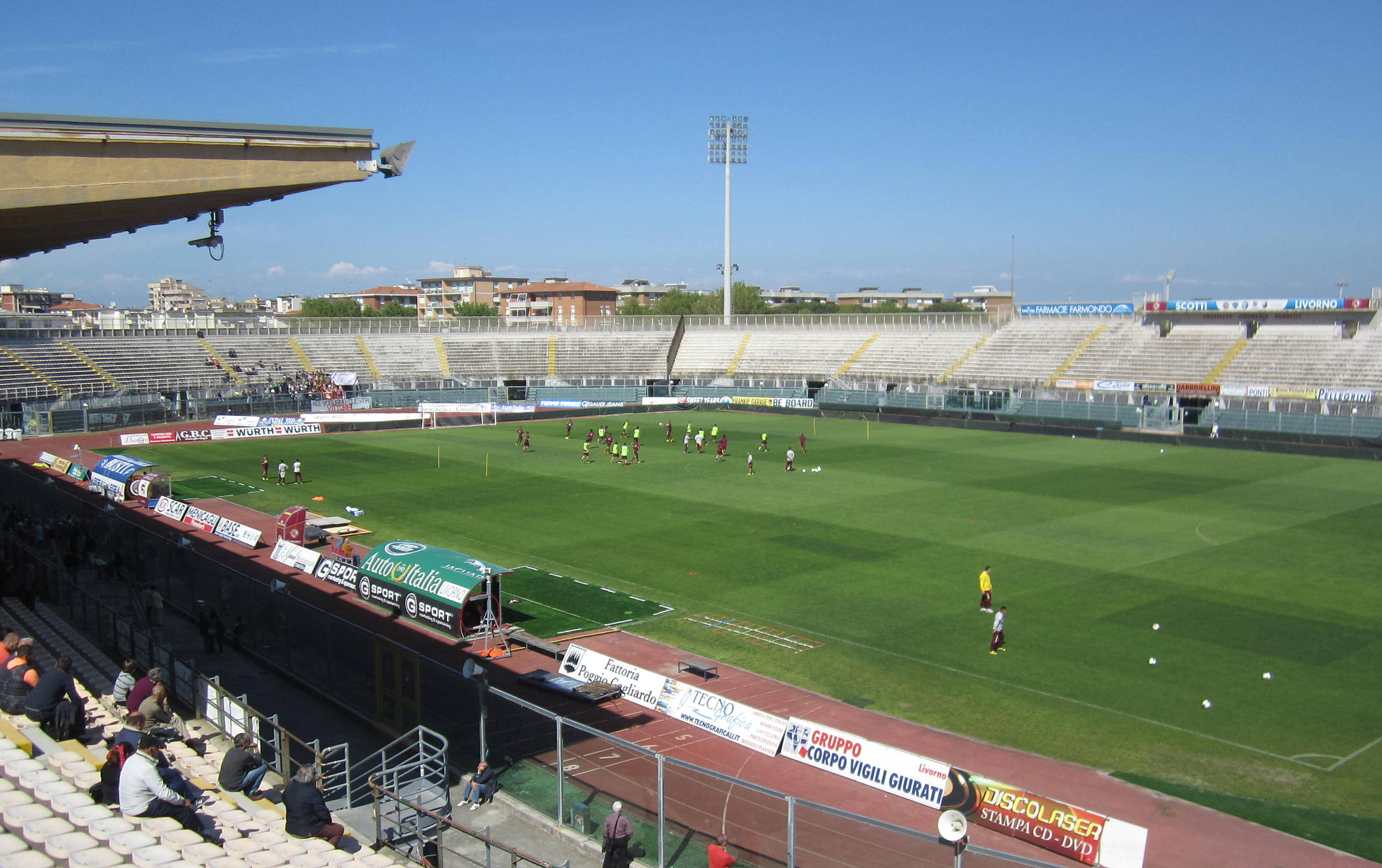 Stadio Armando Picchi a Livorno